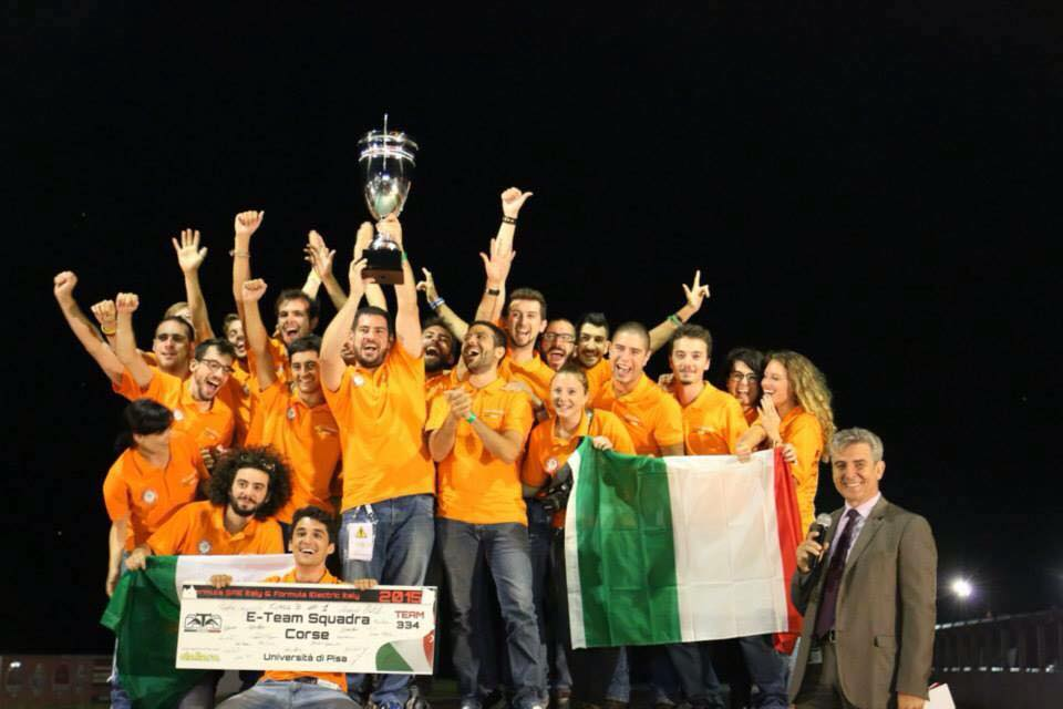 E-Team subito dopo la consegna della coppa rappresentante il primo posto nella classe 3